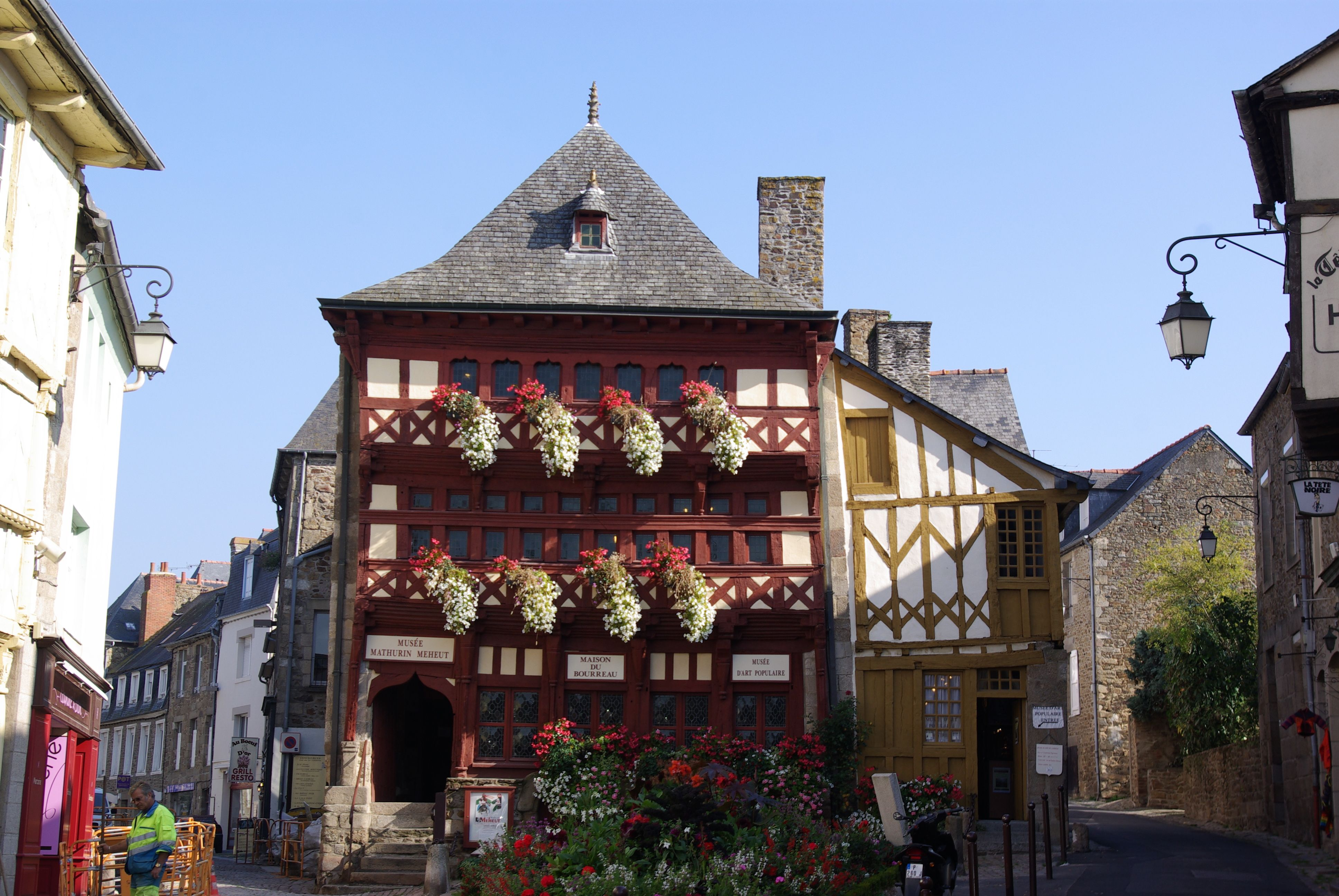 Lamballe in der Bretagne in Frankreich. Das Foto zeigt das Museum, im Rücken ist der Marktplatz (geotags in den EXIF-Daten).